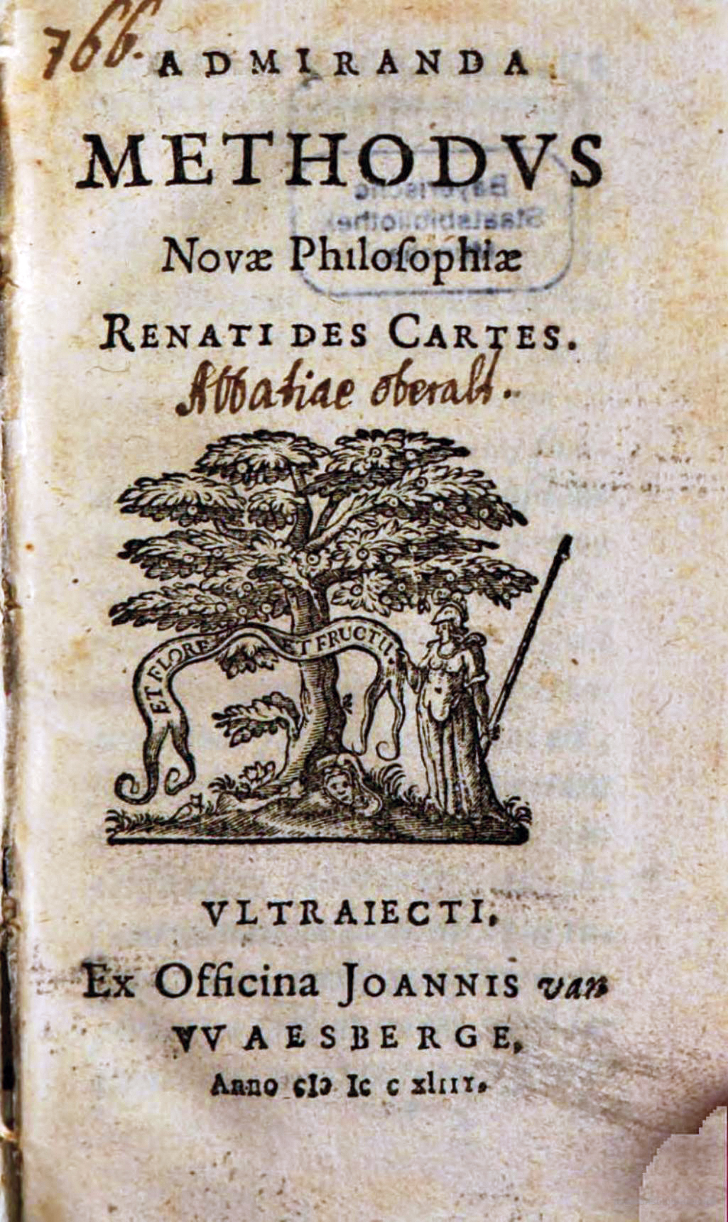 Cover page